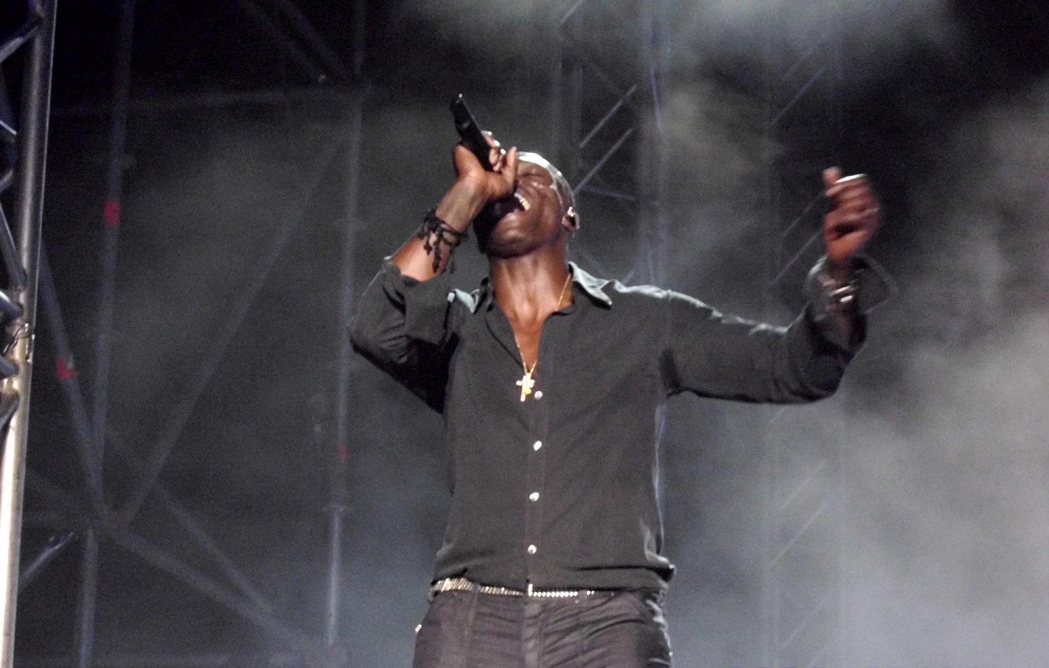 Seal en Sanlucar (Cádiz) España